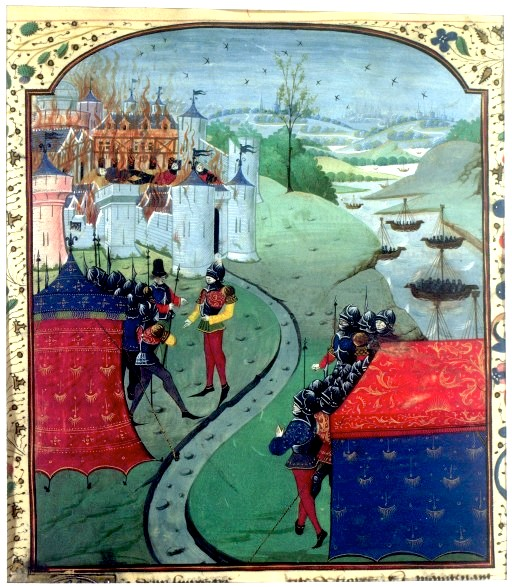 Raoul Lefèvre, Histoires de Troie, Miniature du Maître de Hiéron, Incendie de Troie", BnF Ms 255 fol152 (détail)